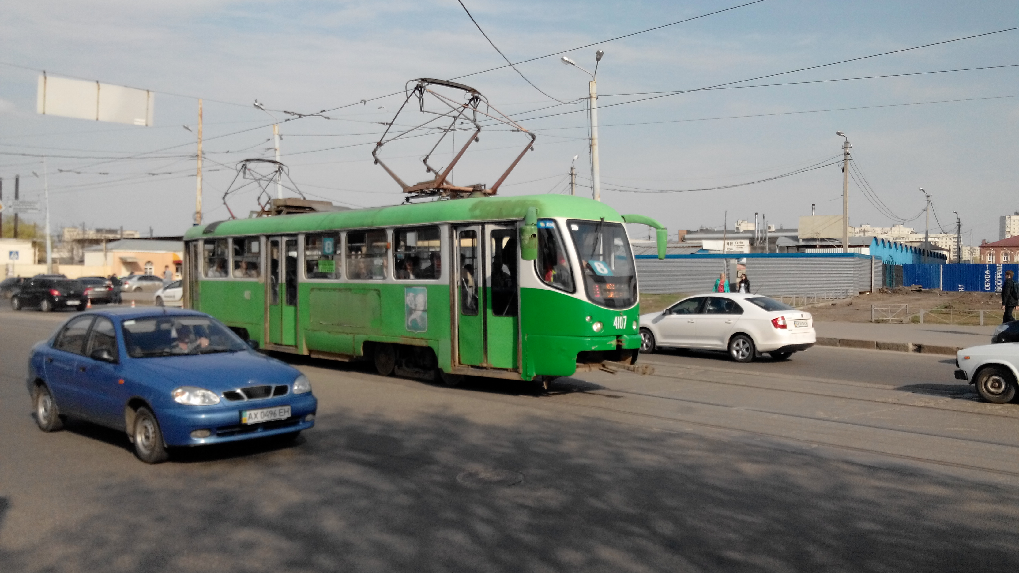 Трамвай Tatra T3ВПА, модернізований на Харківському вагоно-ремонтному заводі (ВАРЗ), на маршруті №8 (602-й мікрорайон - пр-т Гагаріна) в районі Кінного ринку, початок вул. Молочної (колишн. Кірова)